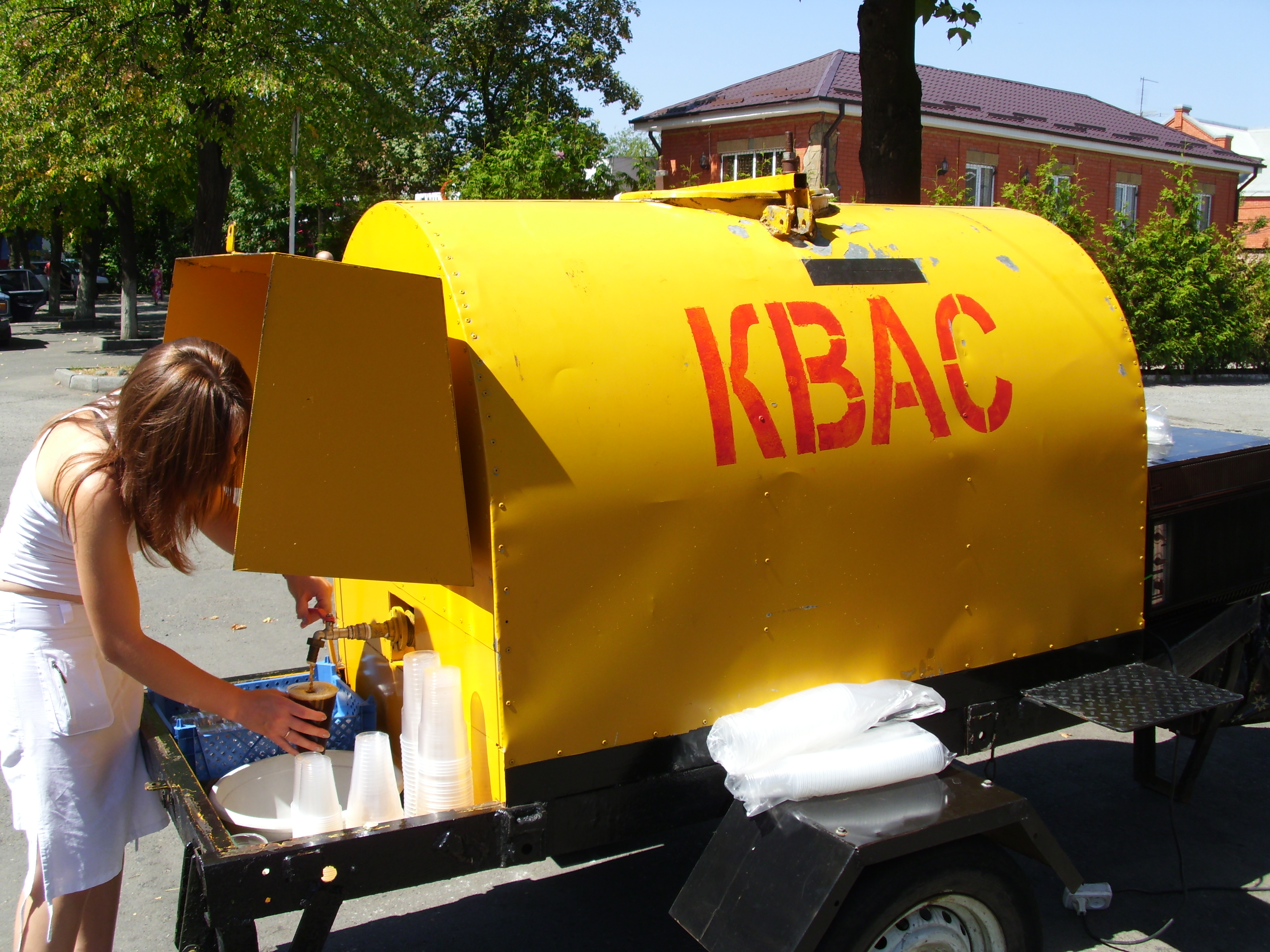 Moderní prodenja nápoje Kvas